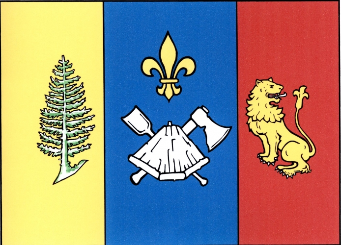 vlajka, Světnov, okres Žďár nad Sázavou